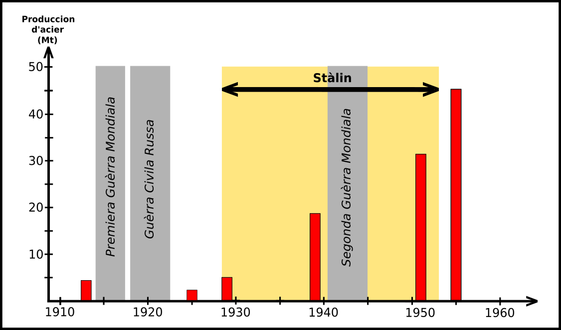 Produccion d'acier russa e sovietica de 1913 a 1955.